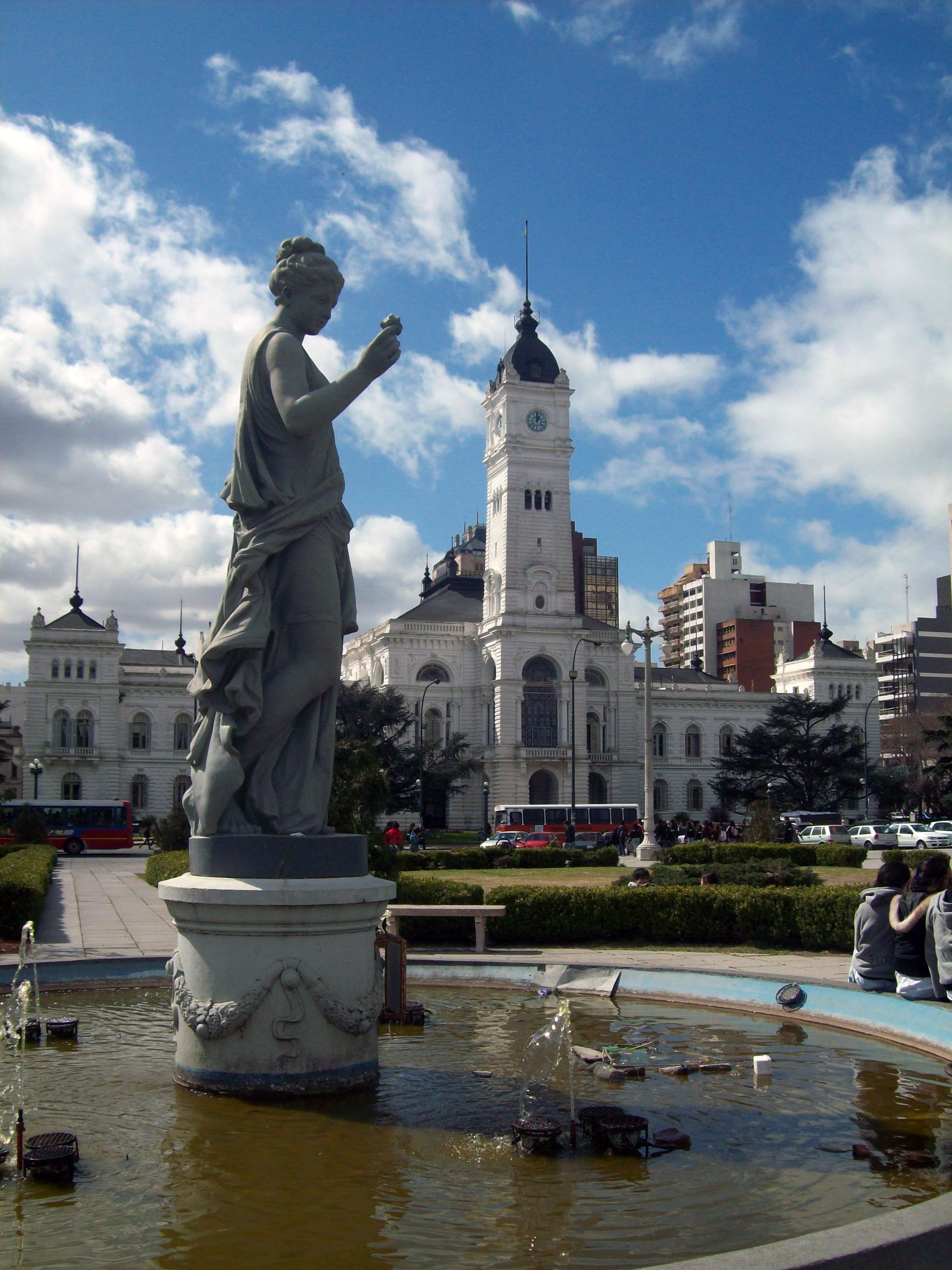 Municipalidad de La Plata (Argentina). Plano general con estadua del conjunto escultórico 'Las Cuatro Estaciones'.